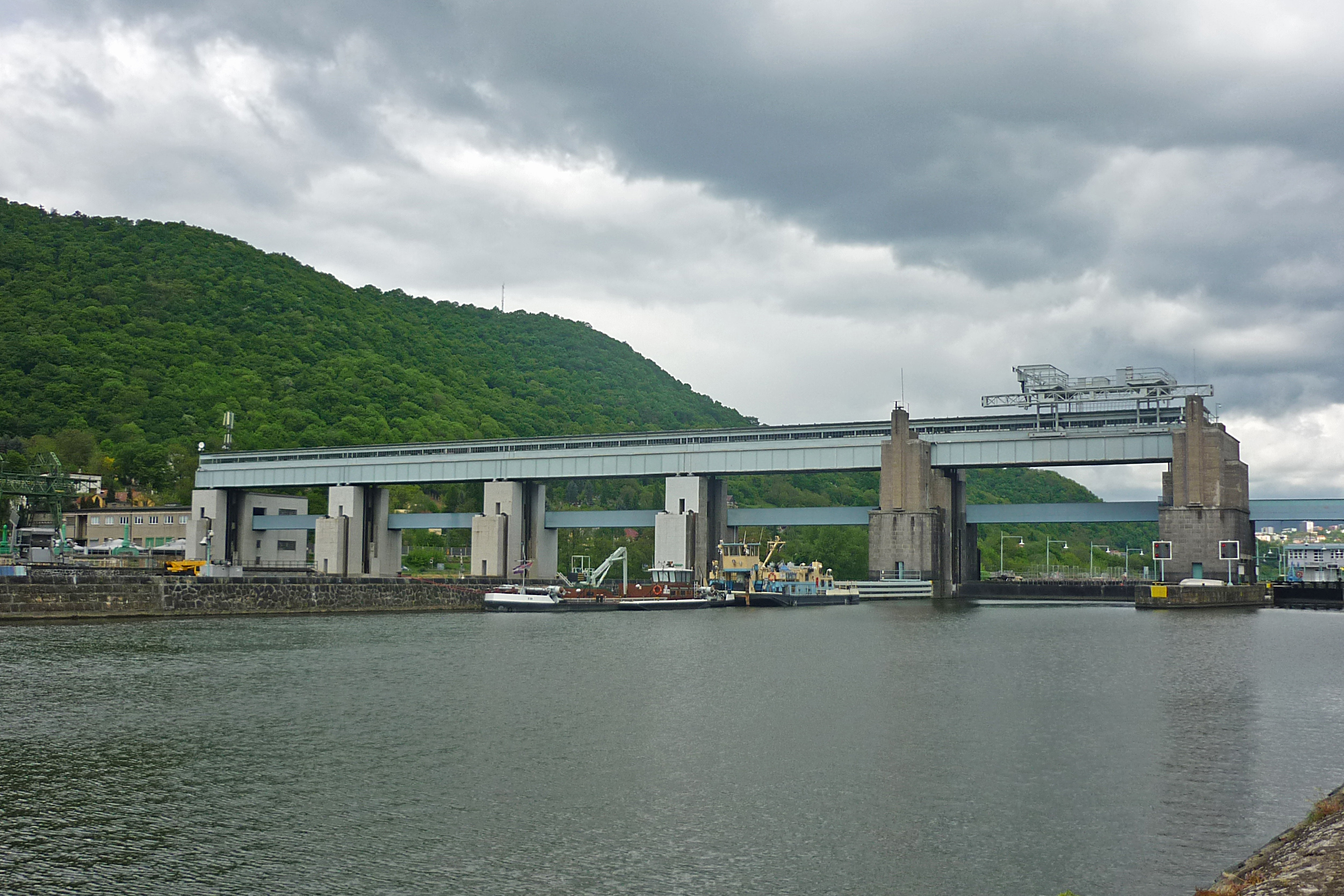 Elbestaustufe am Schreckenstein bei Aussig (Ústí nad Labem)